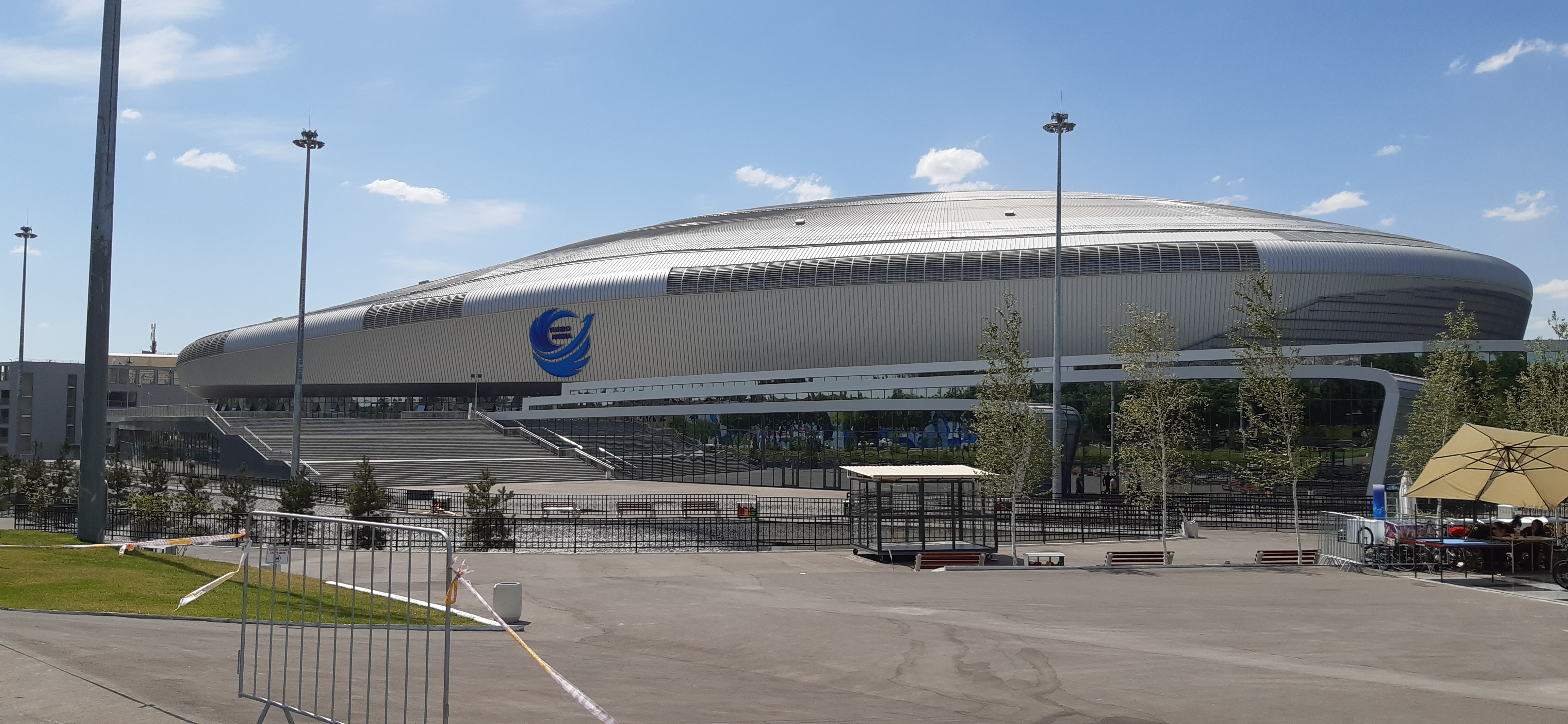 Хумо Арена весной 2019 года